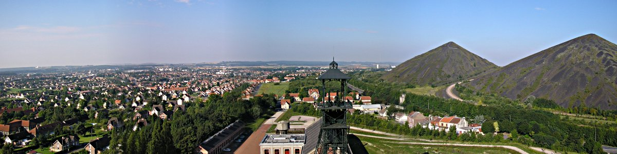 Vue panoramique de Liévin, Pas-de-Calais, France, prise par moi-même le 9 août 2005 depuis le site Écopôle 11/19 à Loos-en-Gohelle (à droite le terril double du 09/11). Hemmer 10:01, 2 October 2005 (UTC)